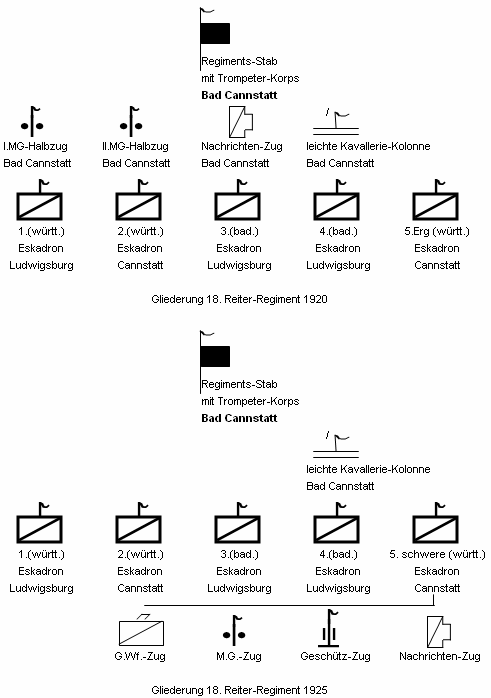 Gliederung 18. Reiter-Regiment der Reichswehr 1920 und 1925 (Taktische Zerichen der Reichswehr)